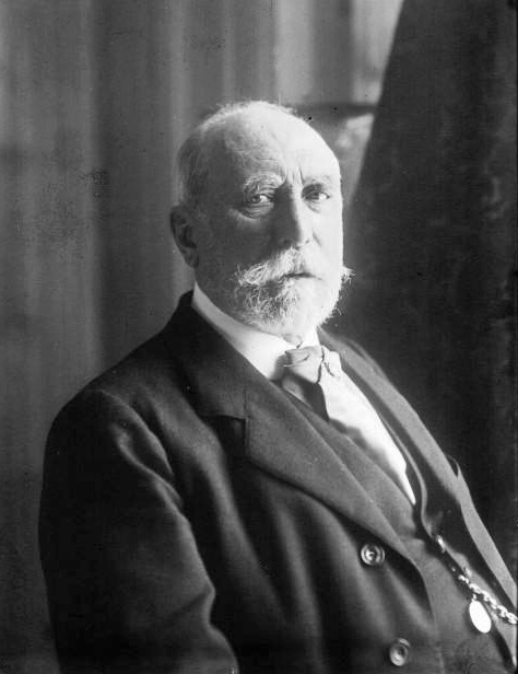 M. Paul Peytral, sénateur des Bouches-du-Rhône, ancien ministre : photographie de presse